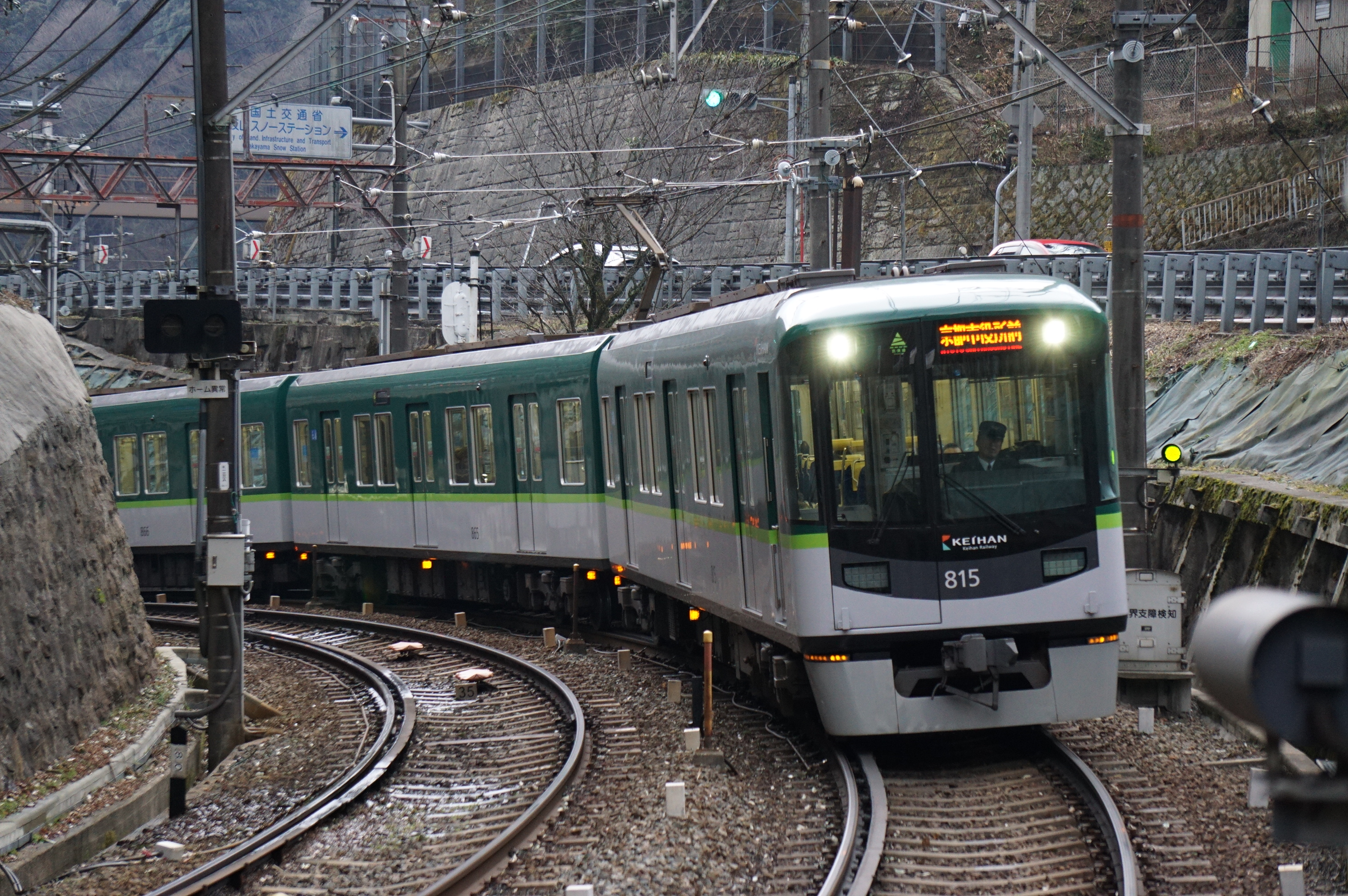 新塗装化された815F Sony ILCE-6000